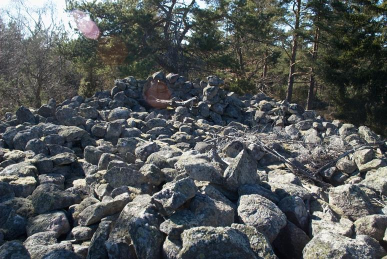 RAÄ-nummer Lösen 31:1. Röse. Bronsålder. Motiv: Lösen 31:1 Kategori: Röse RAÄ-nummer Lösen 31:1. Röse. Bronsålder. Lösen 31:1.